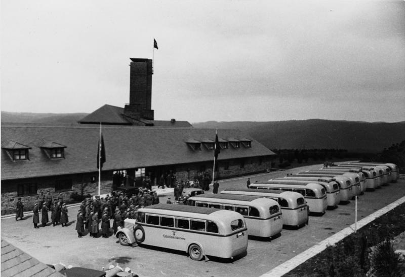 Kreisleitertagung auf der Ordensburg Vogelsang vom 22.-29.04.1937